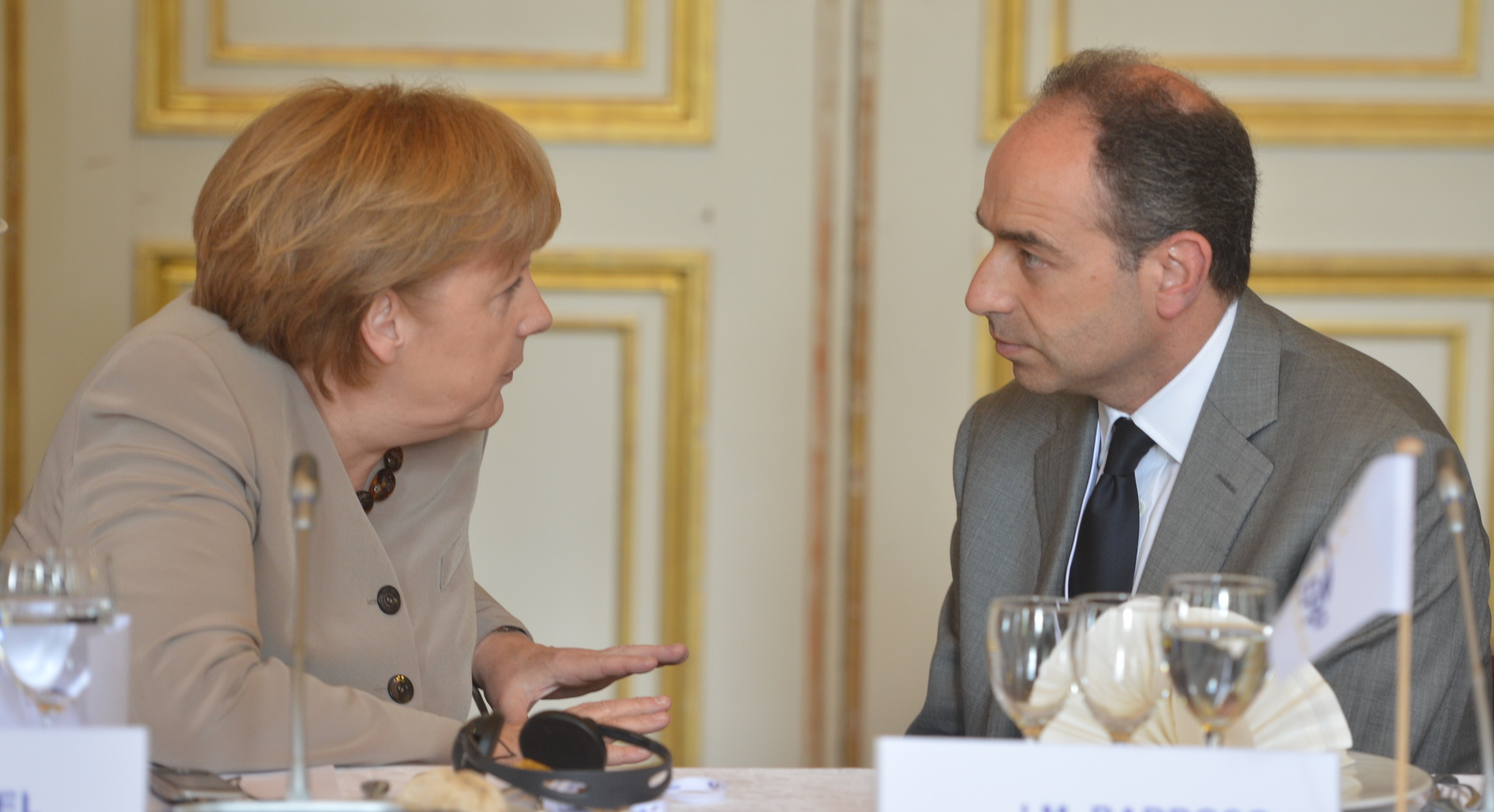 EPP Summit, 28 June 2012